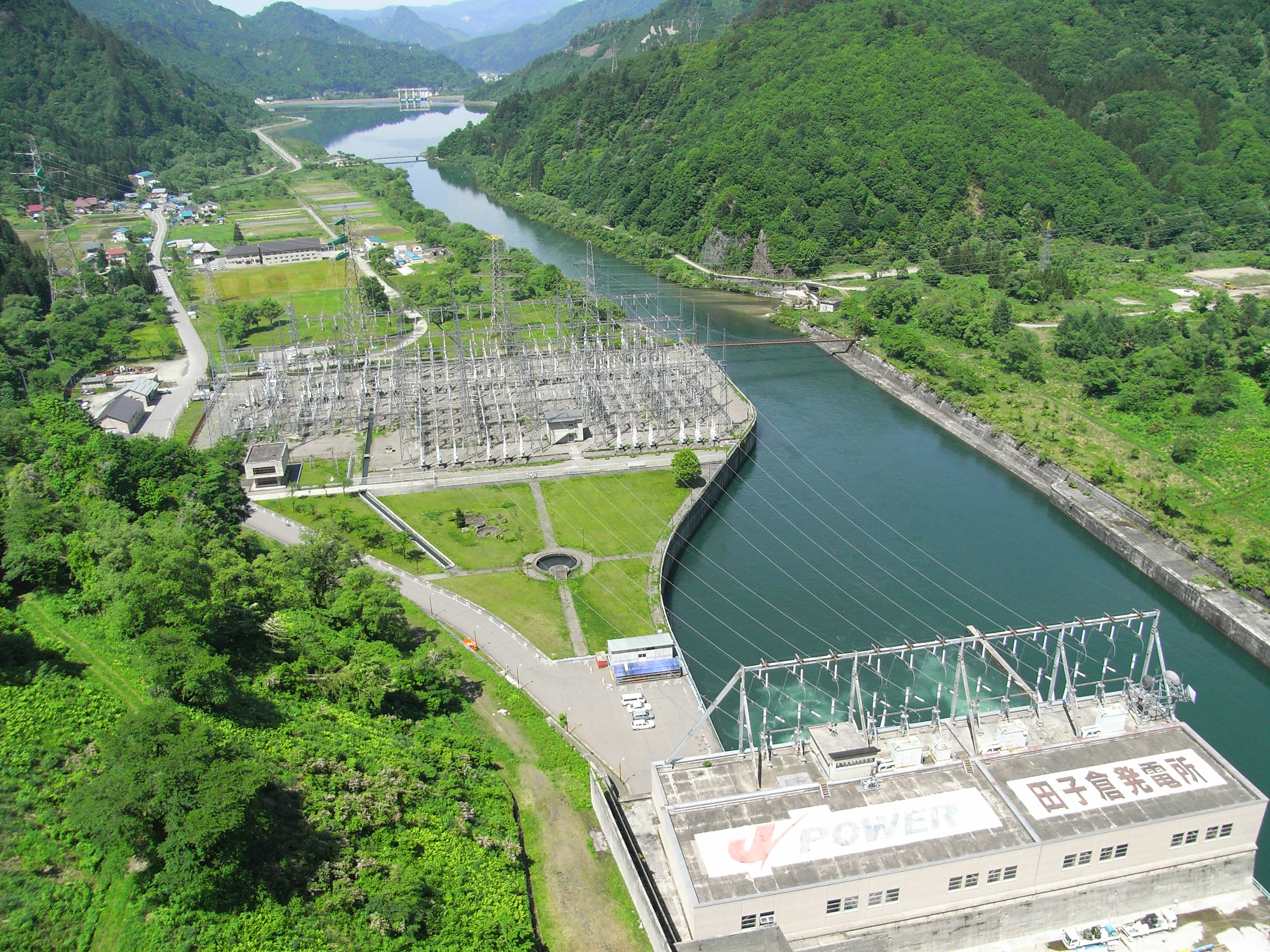 Hydroelectric Powerplant